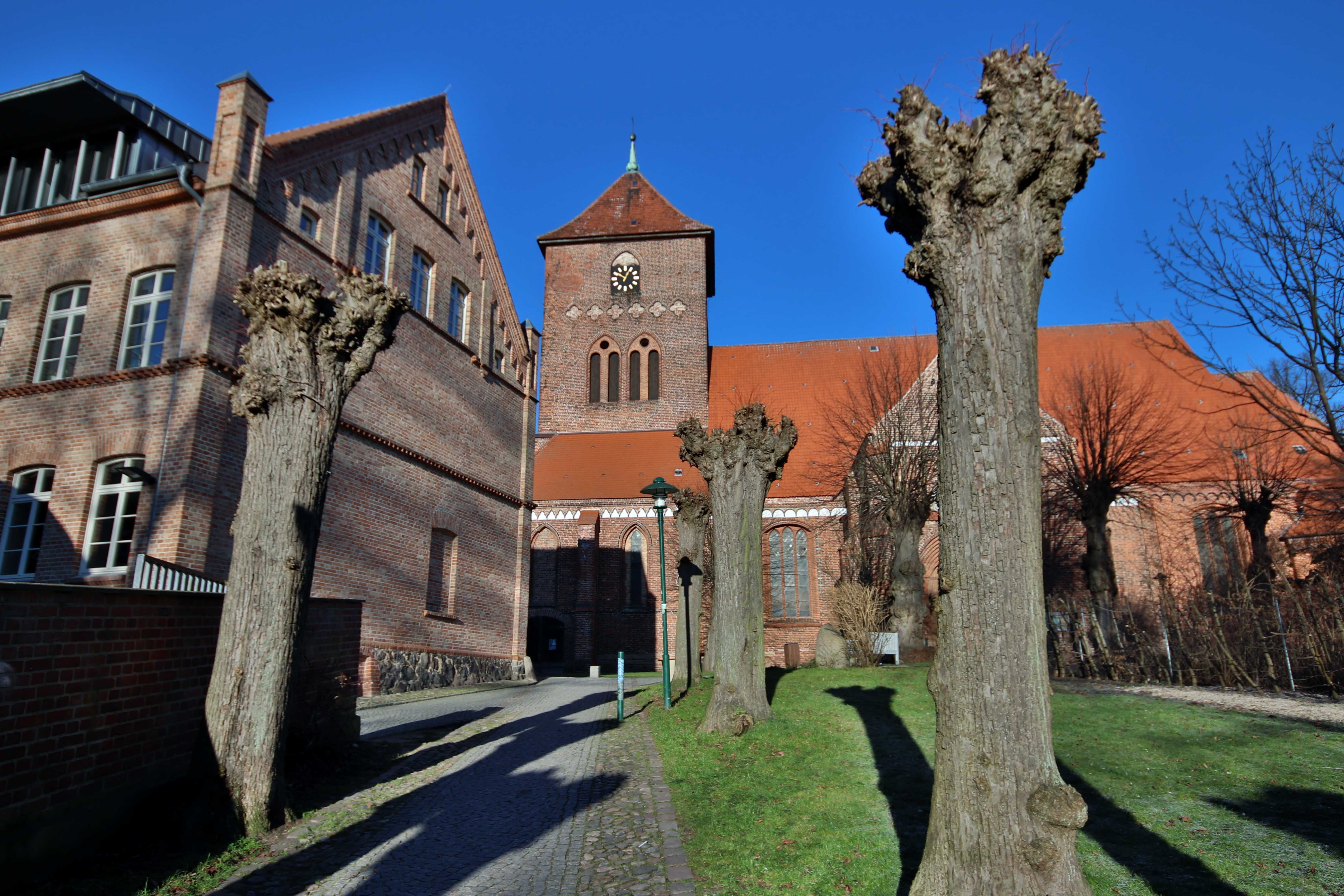 Blick von der Bürgerwiese auf den Kirchplatz St. Nikolai, Grevesmühlen